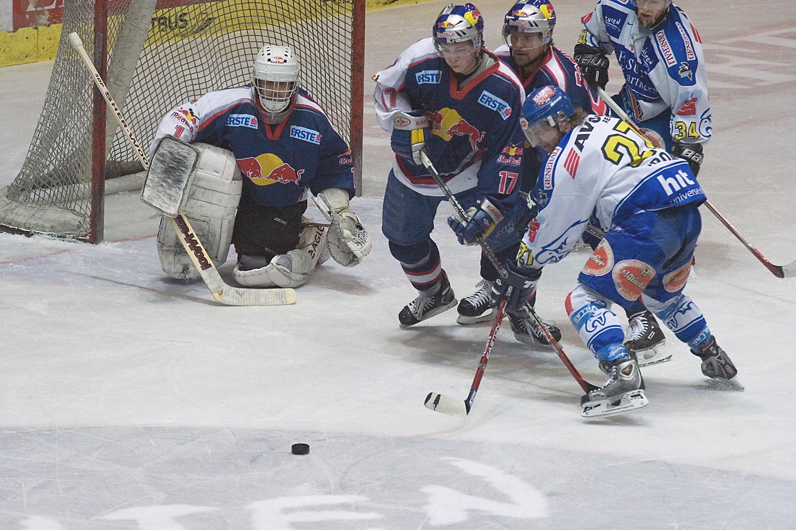 Spieler von Red Bull Salzburg im Spiel gegen den EC VSV. Torhüter ist der Lette Arturs Irbe